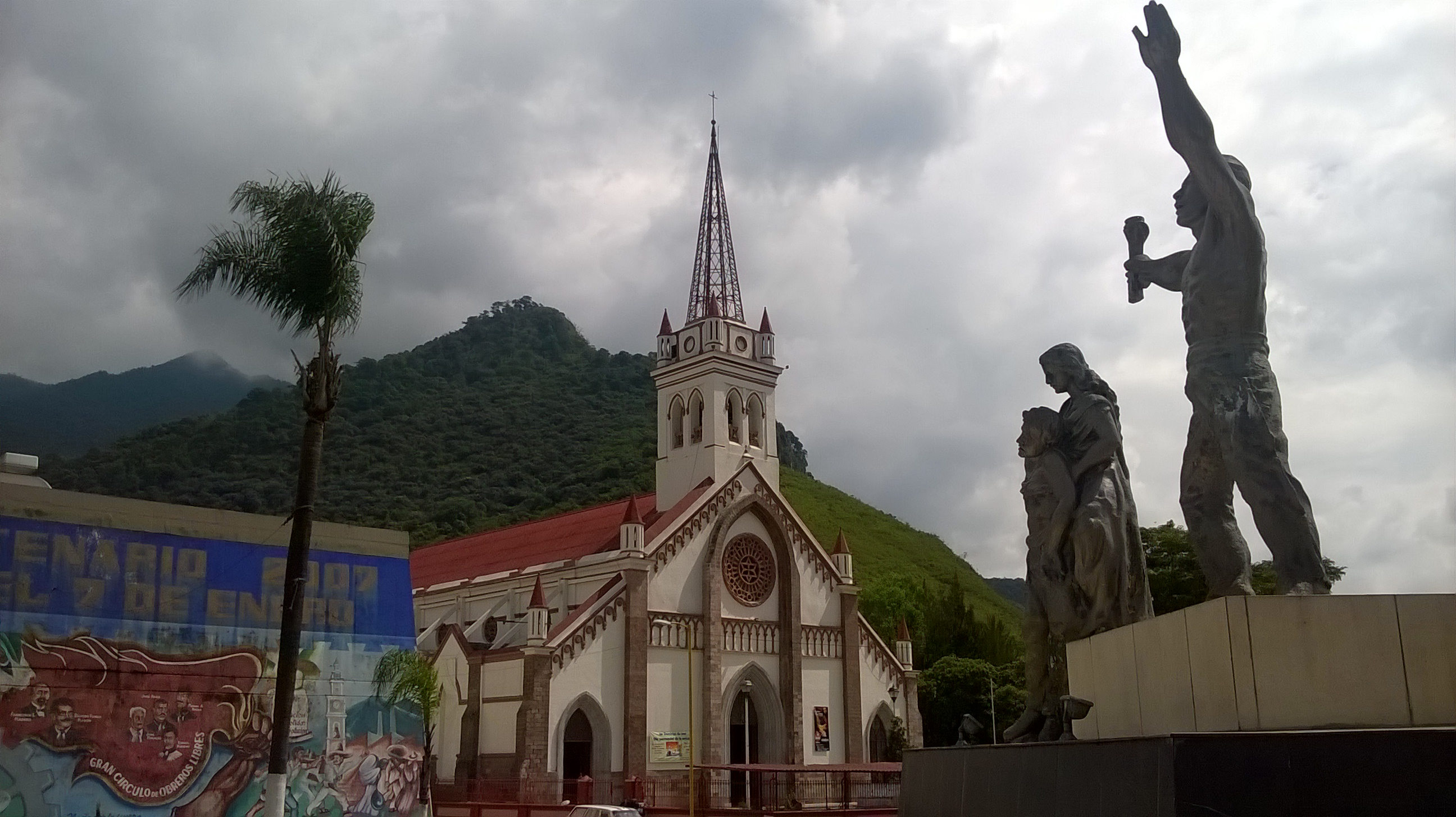 Portada de Río Blanco, Veracruz